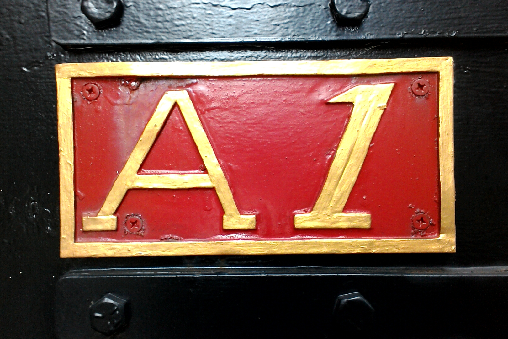 三峽炭礦A1號蒸汽機車車牌,新北市中和區民生里